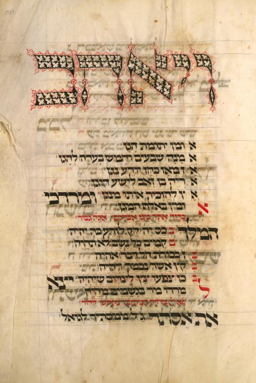 תחילת הקרובה לפורים 'ויאהב אומן' מתוך מחזור ניו יורק heb. 224, מחזור אשכנזי מהמאה ה-14